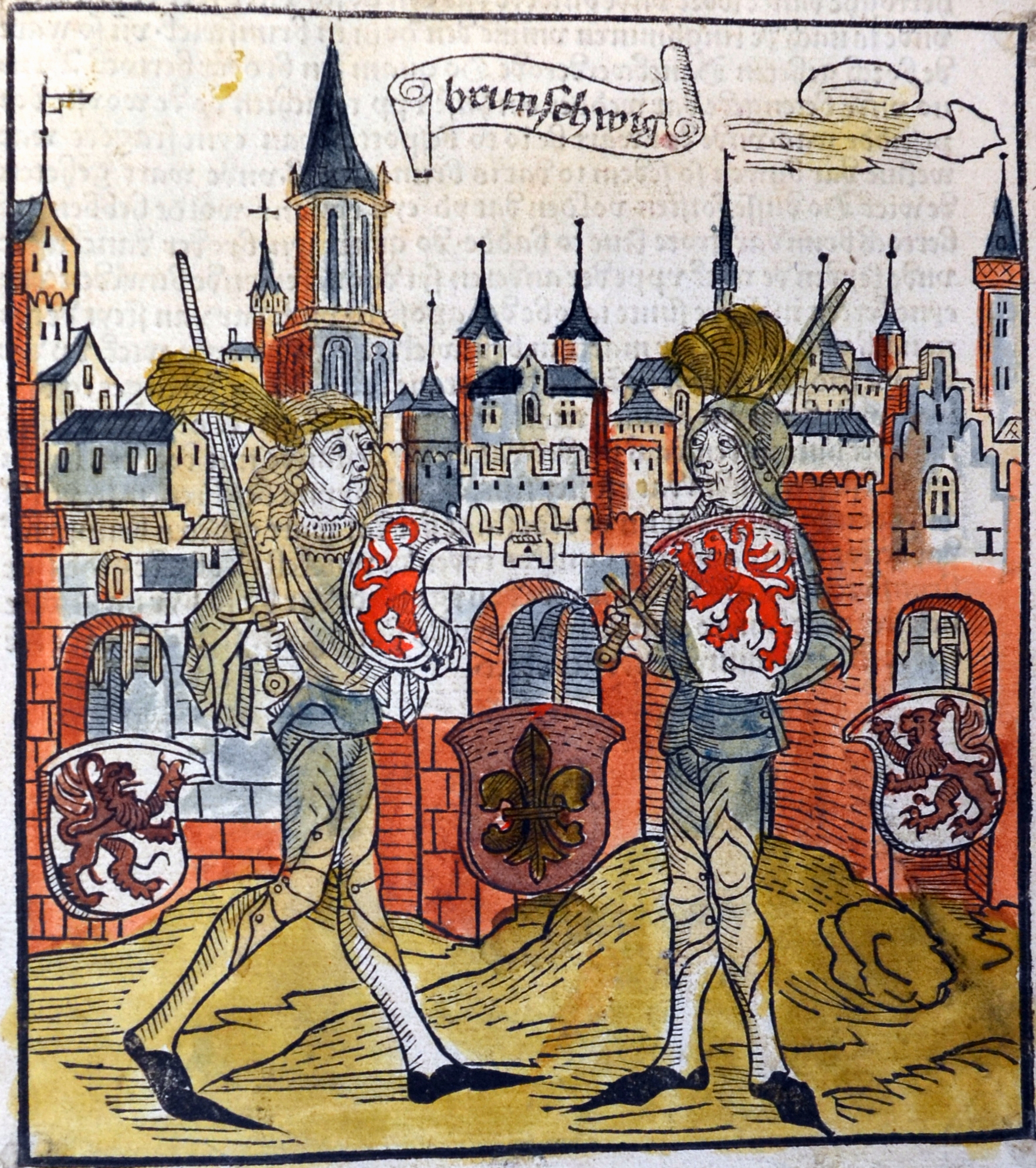 Sachsenchronik von entweder Cord Bote oder Hermann Bote aus dem Jahre 1492: Abbildung der Stadt Braunschweig („brunschwig“). Im Vordergrund wohl zwei Ritter der Lilienvente, auf den Schilden der Braunschweiger Löwe und in der Mitte die Lilie.